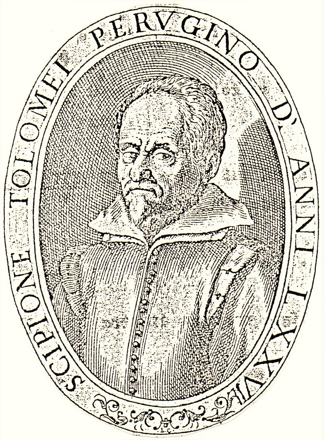 ritratto del letterato perugino Scipione Tolomei